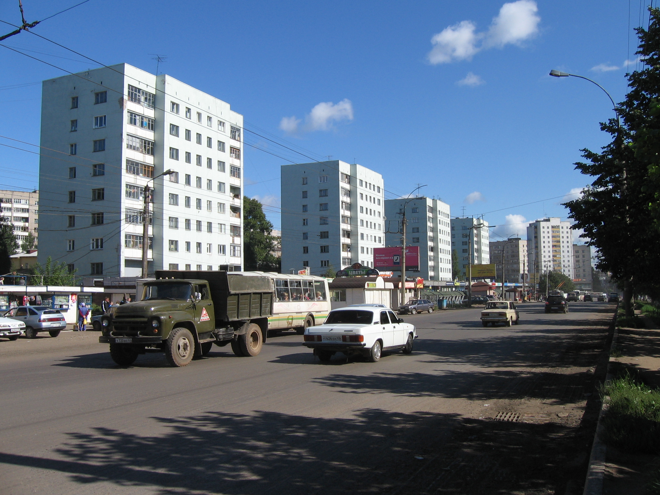 Kirov